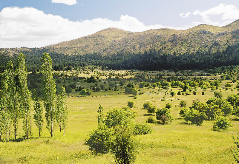 „et in arcadia ego". Arkadien, eine Pastorale - grün, friedlich, menschenleer Berghöhen: Total abgebrannt. Seit Jahren ohne Wiederaufforstung... Mountaintops: eroded by fires, after years still no afforestation...